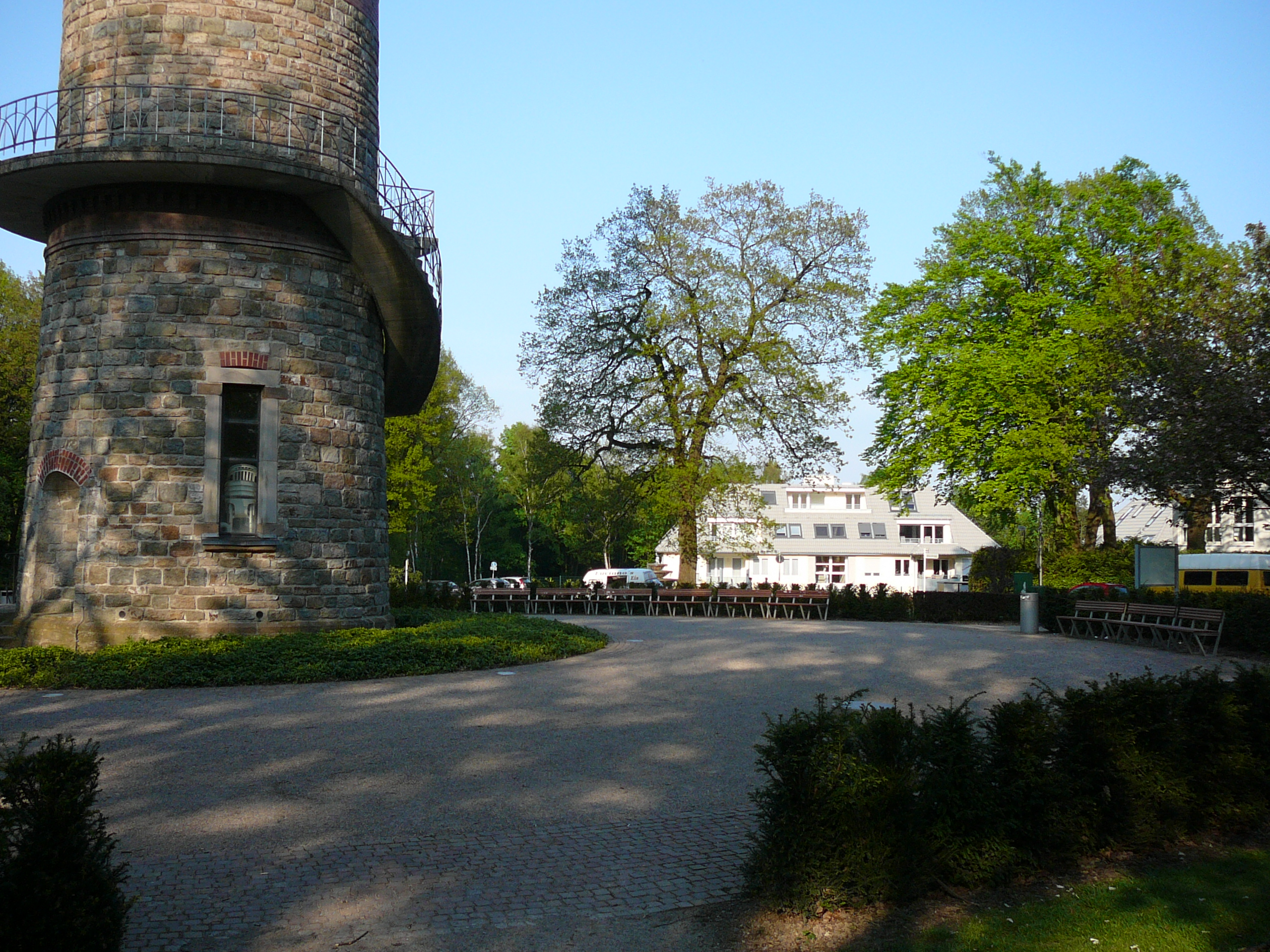 Adolf-Vorwerk-Straße, Wuppertal